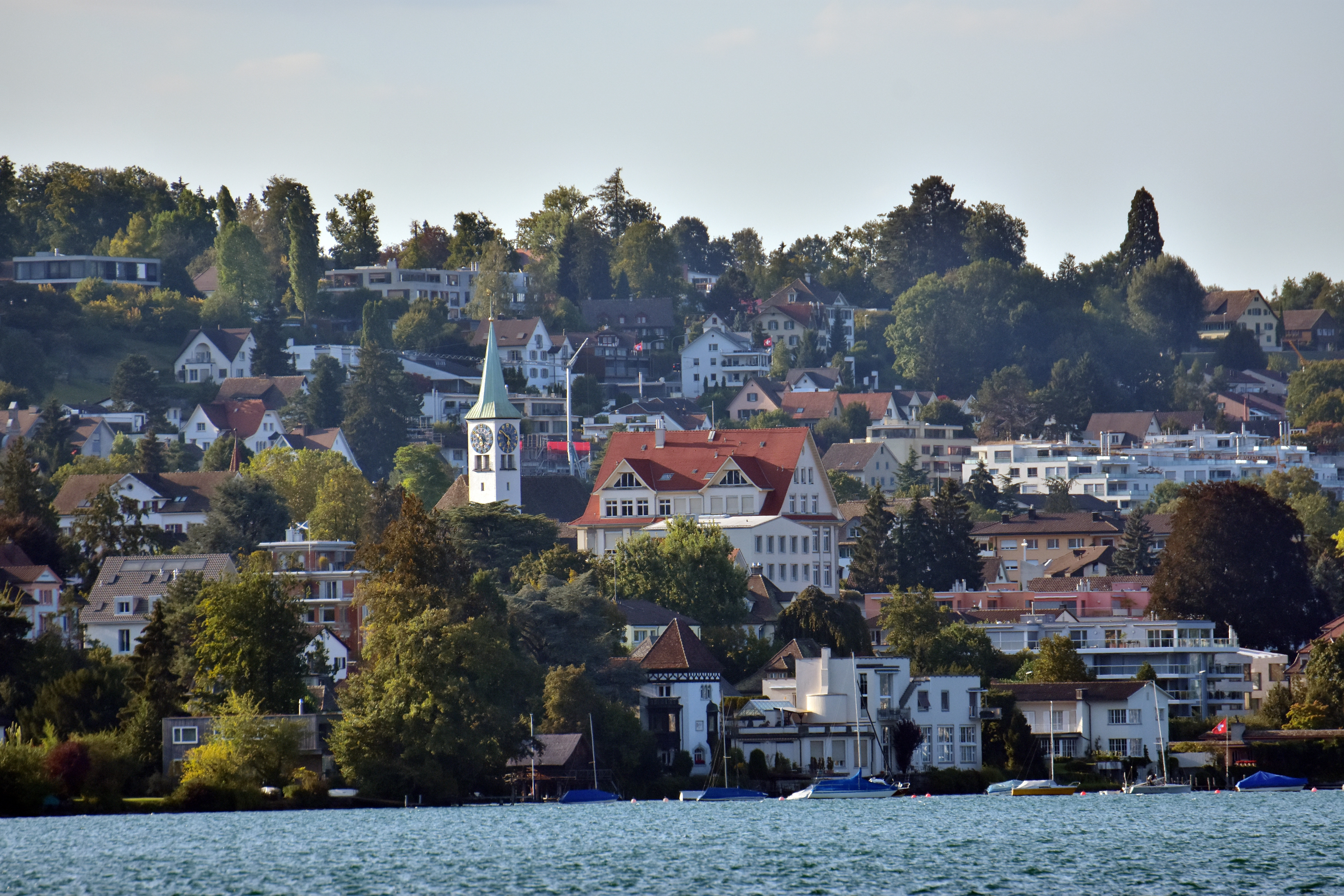 Rüschlikon as seen from ZSG ship MS Helvetia on Zürichsee in Switzerland